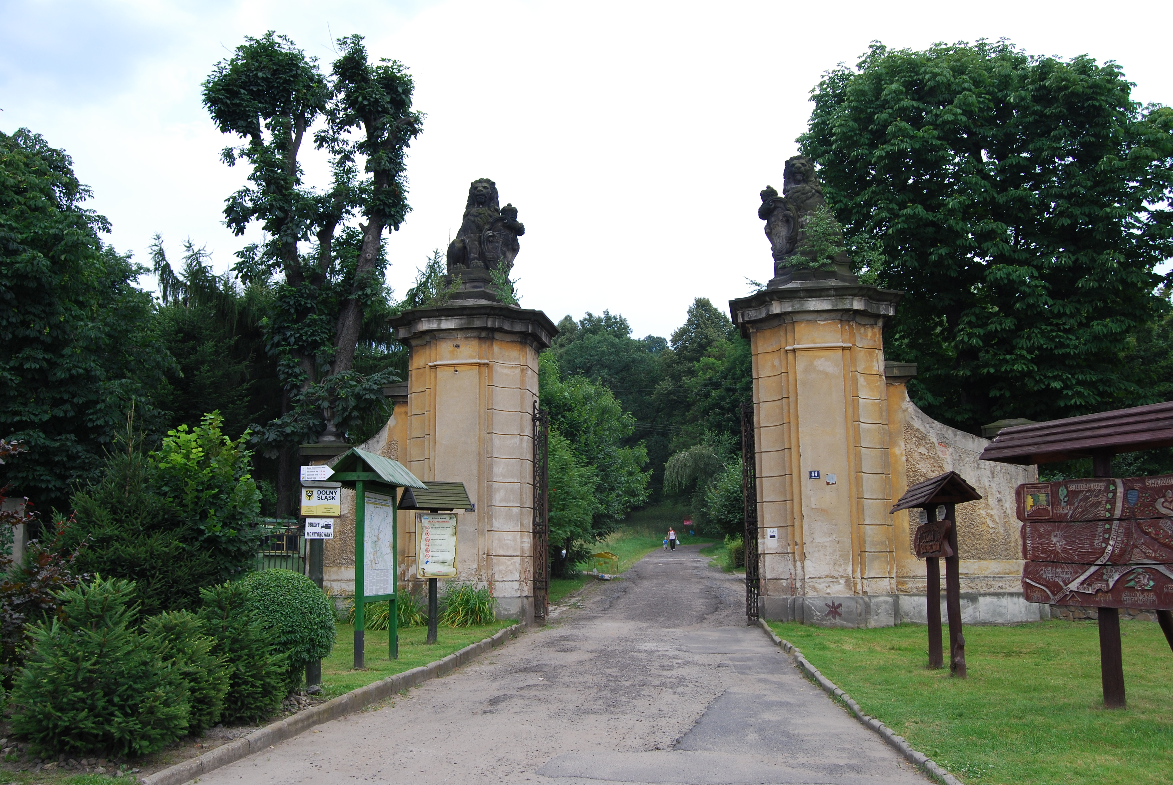 Świebodzice, ul. Wałbrzyska - brama wjazdowa do parku w zespole zamku Książ (zabytek nr 1231/Wł z dn. 16.06.1987)